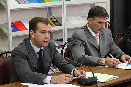 На совещании по развитию сети научно-образовательных центров в России. Справа – ректор Московского инженерно-физического института Михаил Стриханов. Слева - Дмитрий Медведев